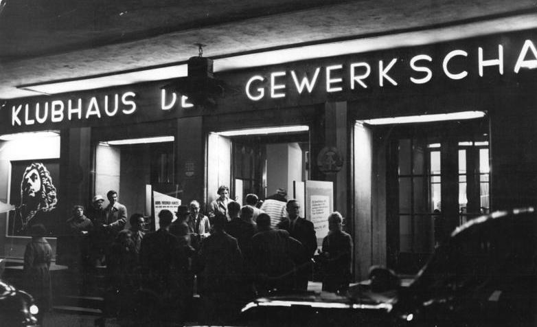 Halle, Klubhaus, Nacht Zentralbild Quaschinsky 14.4.1959 Händel-Ehrung der DDR-Festwoche in Halle - Beweis lebendiger Händel-Pflege Ausdruck und Beweis der lebendigen Händel-Pflege und Erneuerung in der Deutschen Demokratischen Republik sind die Veranstaltungen während der Händel-Festwoche in Halle, die einen Höhepunkt im Händel-Jahr der DDR darstellen. Künstler aus dem In- und Ausland finden sich in Halle zusammen, um in Veranstaltungen von hohem Niveau dem Genius der Musik vor einem internationalen Publikum zu huldigen. UBz: Vor dem Klubhaus der Gewerkschaft in Halle, in dem die Wissenschaftliche Tagung und auch festliche Veranstaltungen stattfinden.